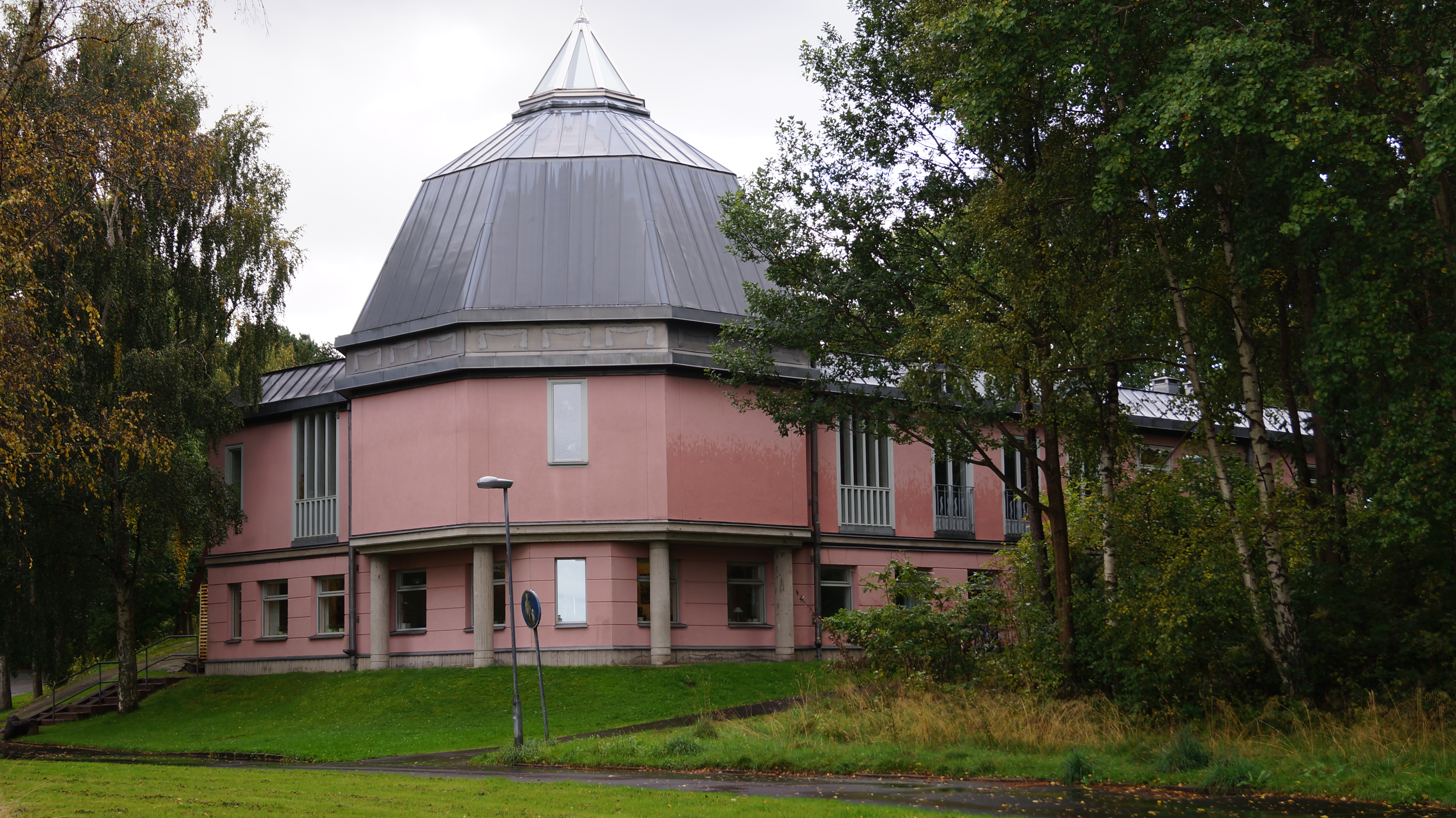 Grevegårdens kyrka (Tynnered 96:1) Kyrka sammanbyggd med församlingshem (1 byggnad)